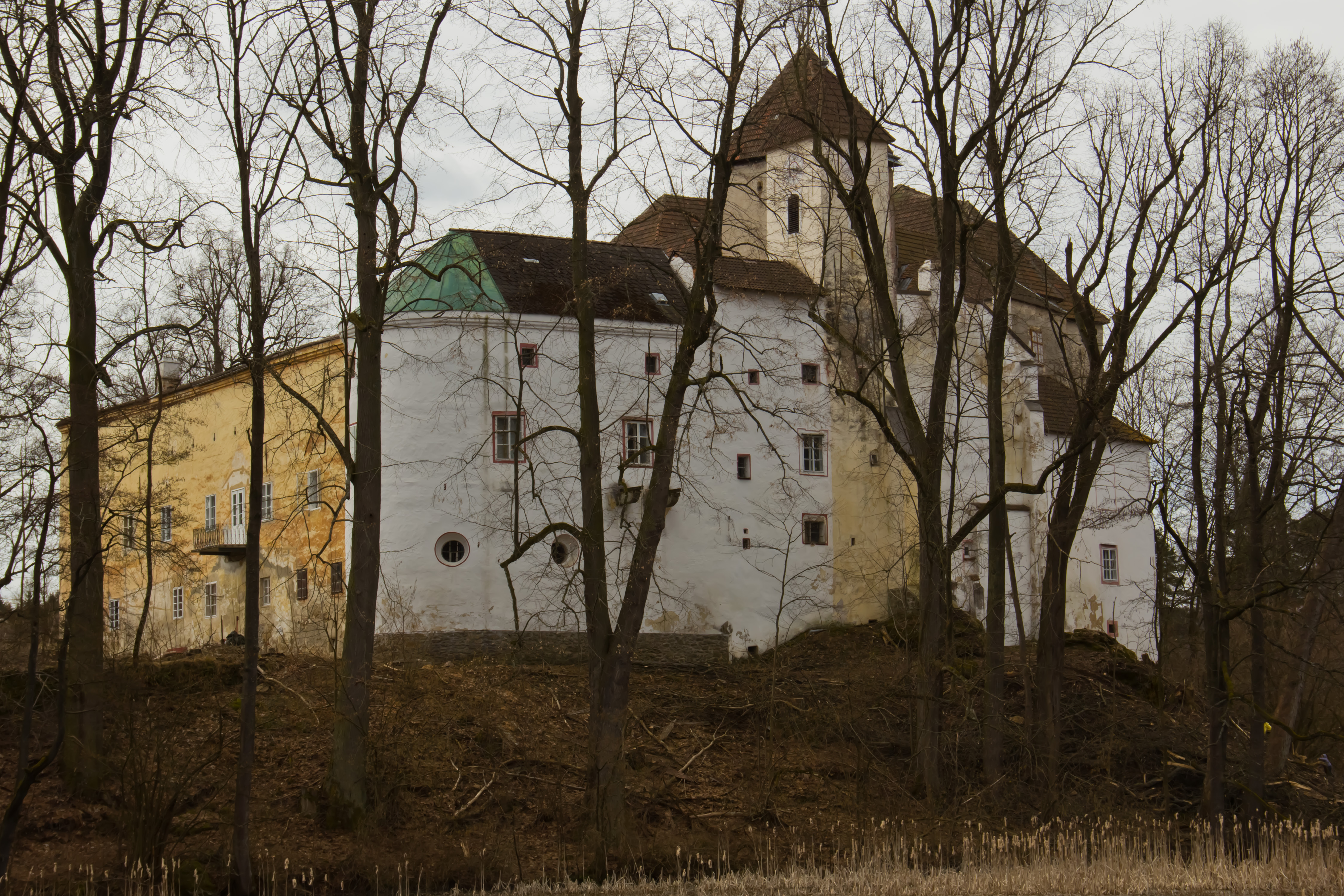 Die ursprünglich mittelalterliche Burganlage wurde im 16. Jahrhundert mehrmals umgebaut. Die Schlosskapelle besitzt eine gotische und barocke Ausstattung.